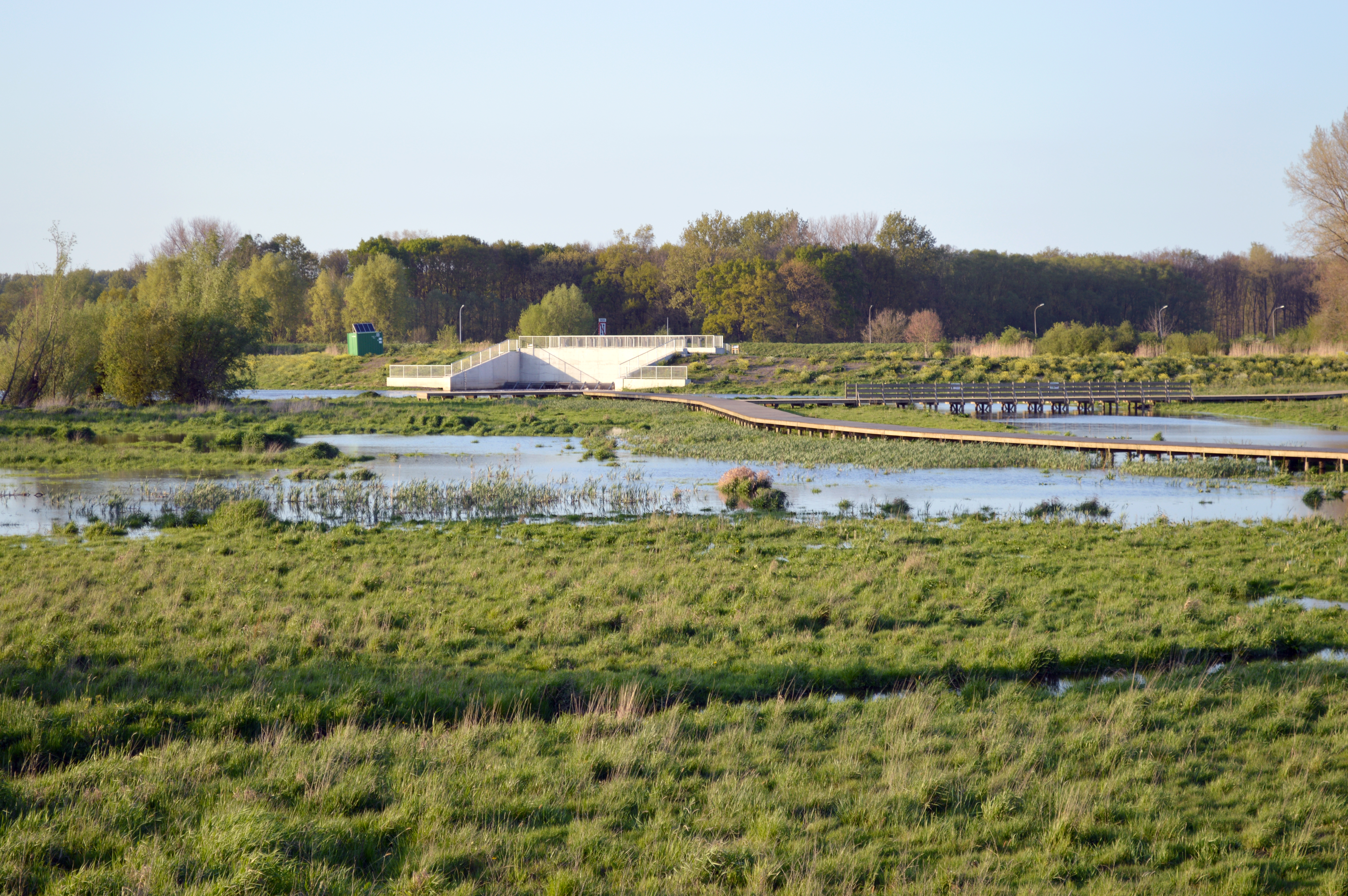 Natuurgebied Bergenmeersen, Wichelen, met zicht op de sluis.